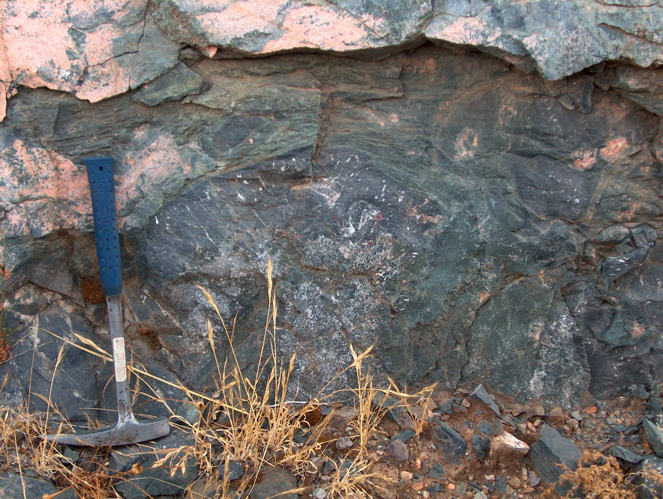 Anstehende Pillowlava in Spanien, an der Straße von Frenegal nach Huelva am km107